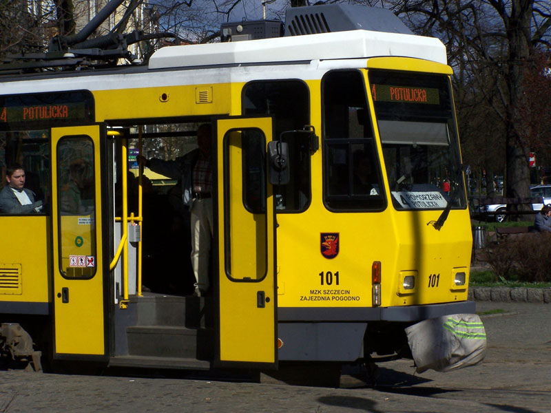 Tatra KT4Dt w Szczecinie.